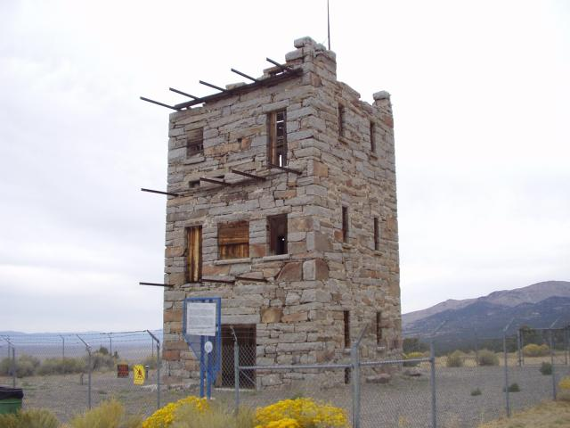 Stokes Castle, near Austin, Nevada. © 2002 Peter Schmalzer